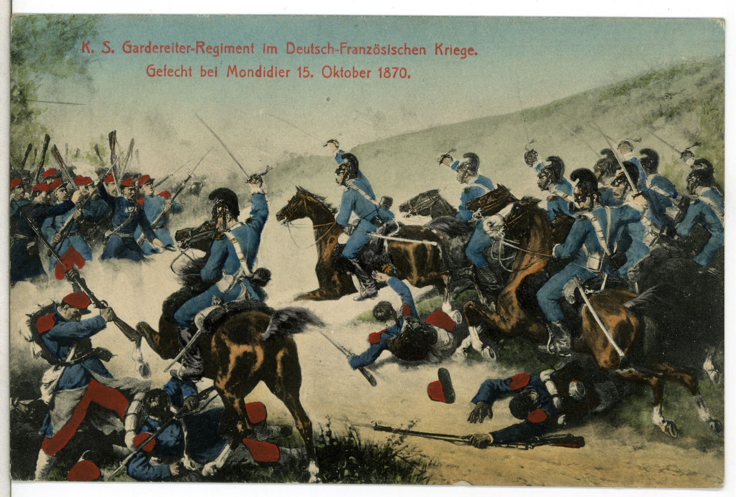 Mondidier; Königlich Sächsisches Gardereiter-Regiment im Gefecht bei Mondiedier 15. Oktober 1870 This postcard is from publisher Brück & Sohn in Meißen ( postcard has a unique number 12138 and is available in a higher resolution at the publisher. This images was uploaded in a cooperation project between Wikipedians and the publisher.